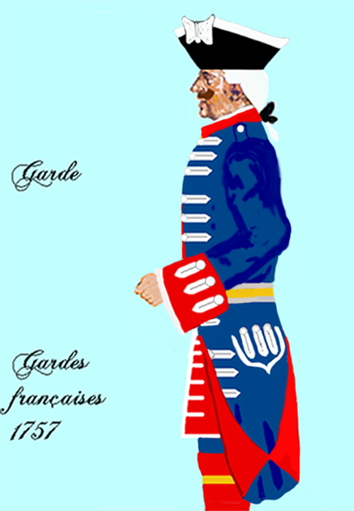 Uniform des Gardes-francaises 1757